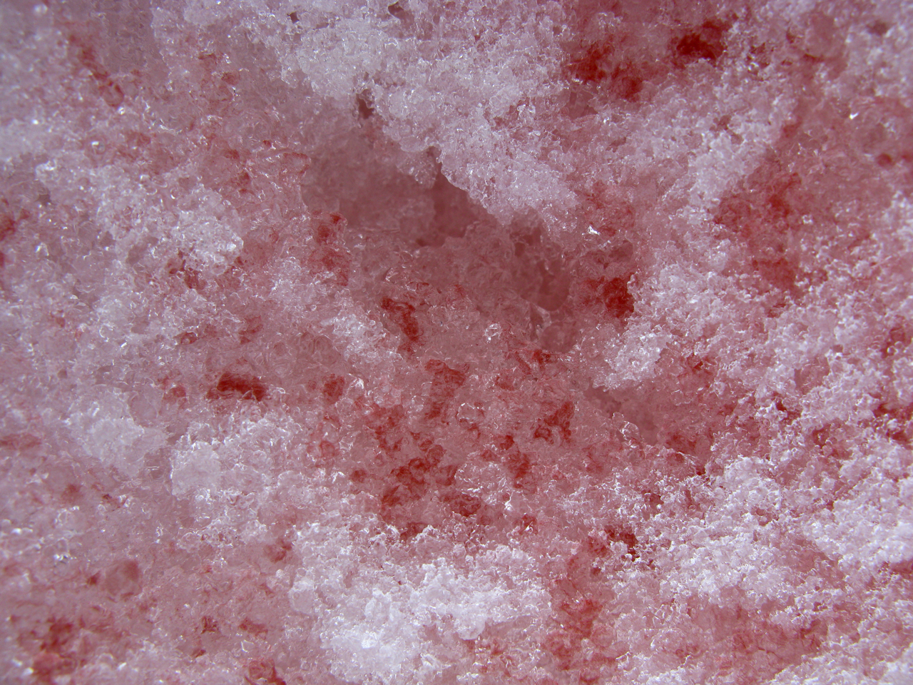 Chlamydomonas nivalis (Antarctique) - 2009